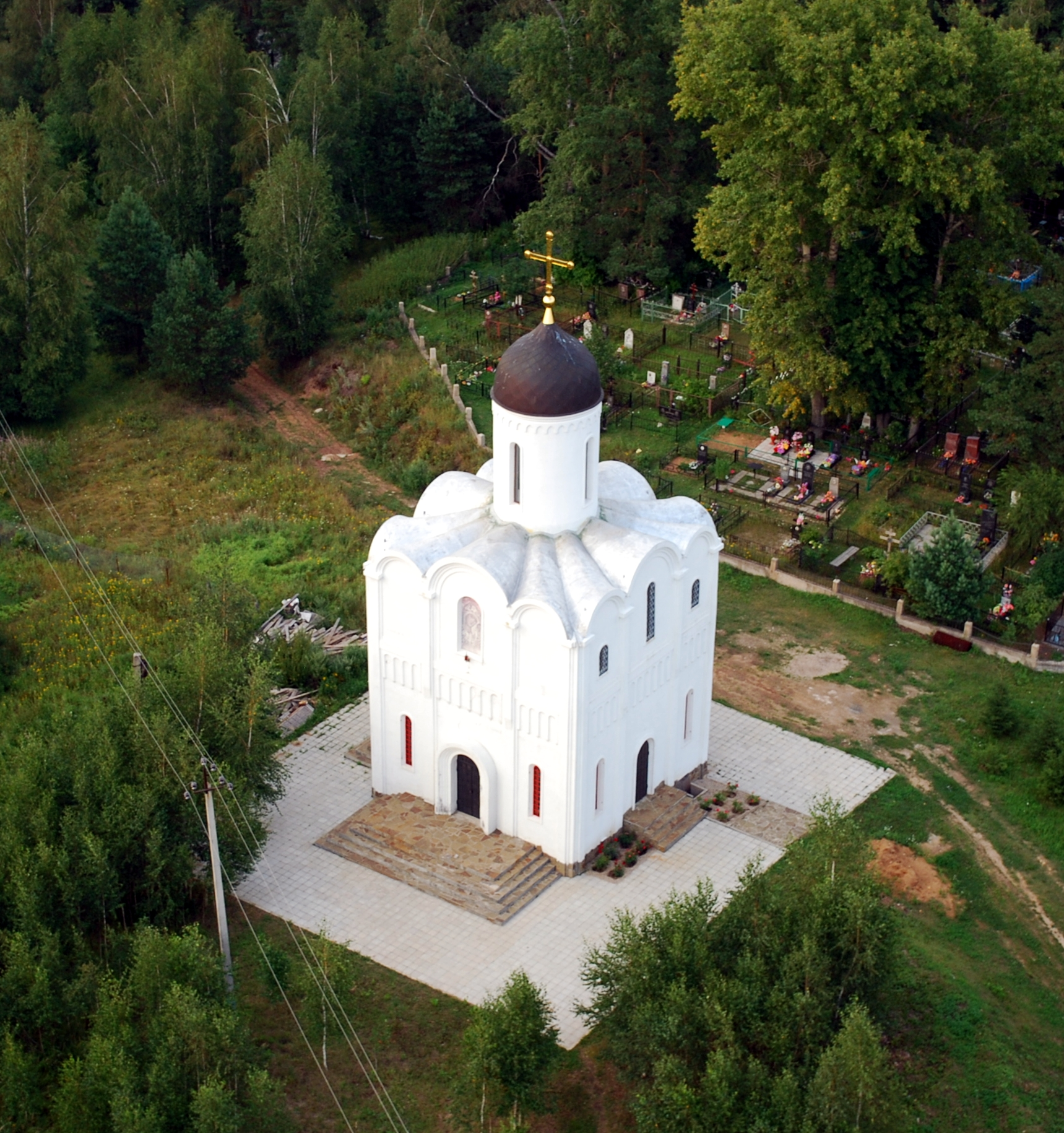 Часовня в Ивановском - пролетая мимо